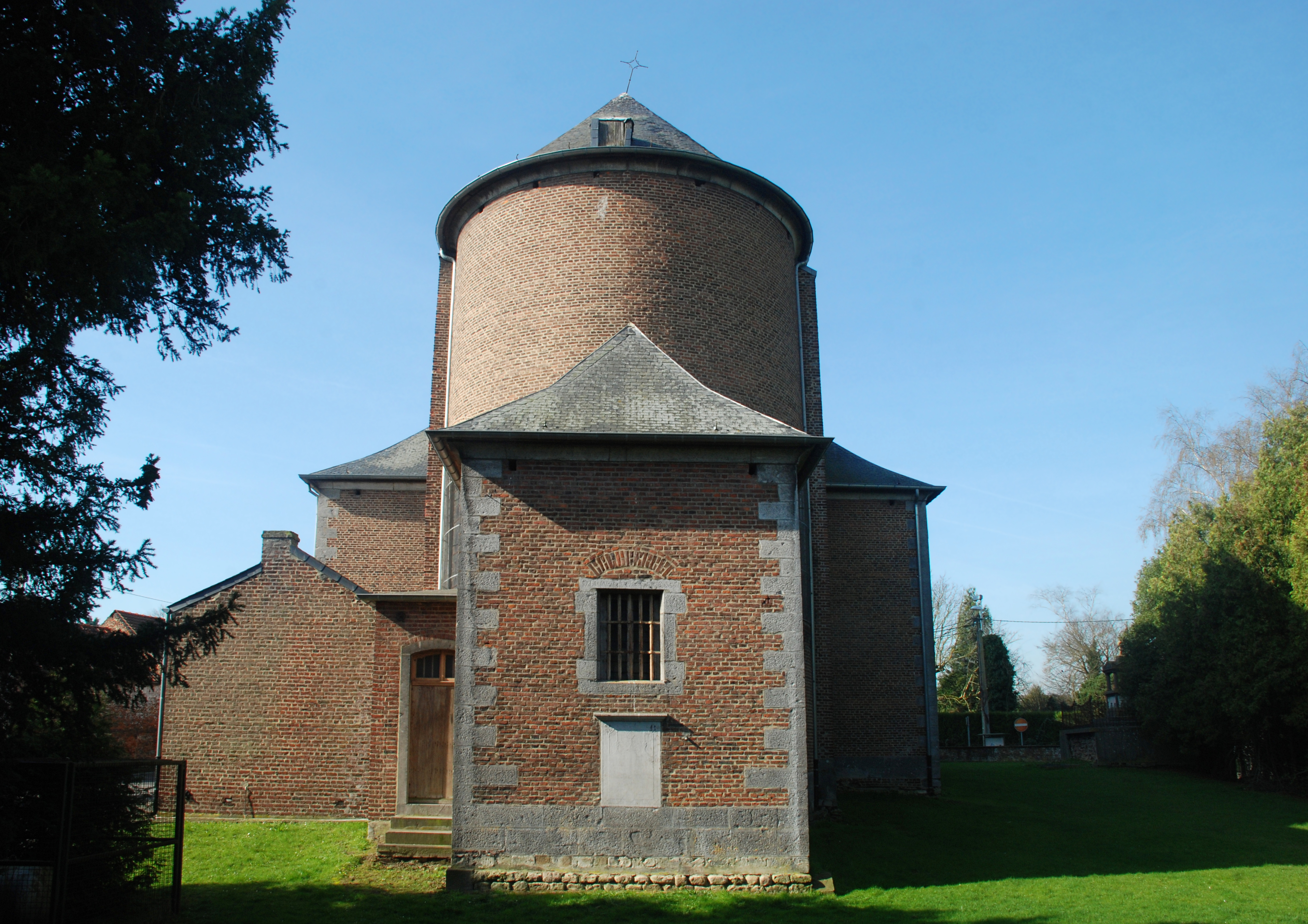 Belgique - Brabant wallon - Genappe - Baisy-Thy - Église Saint-Hubert